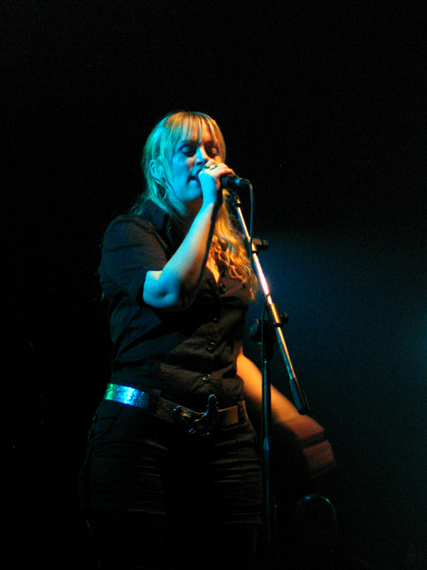 Isobel Campbell, Estragon, Bologna 31st january 2007